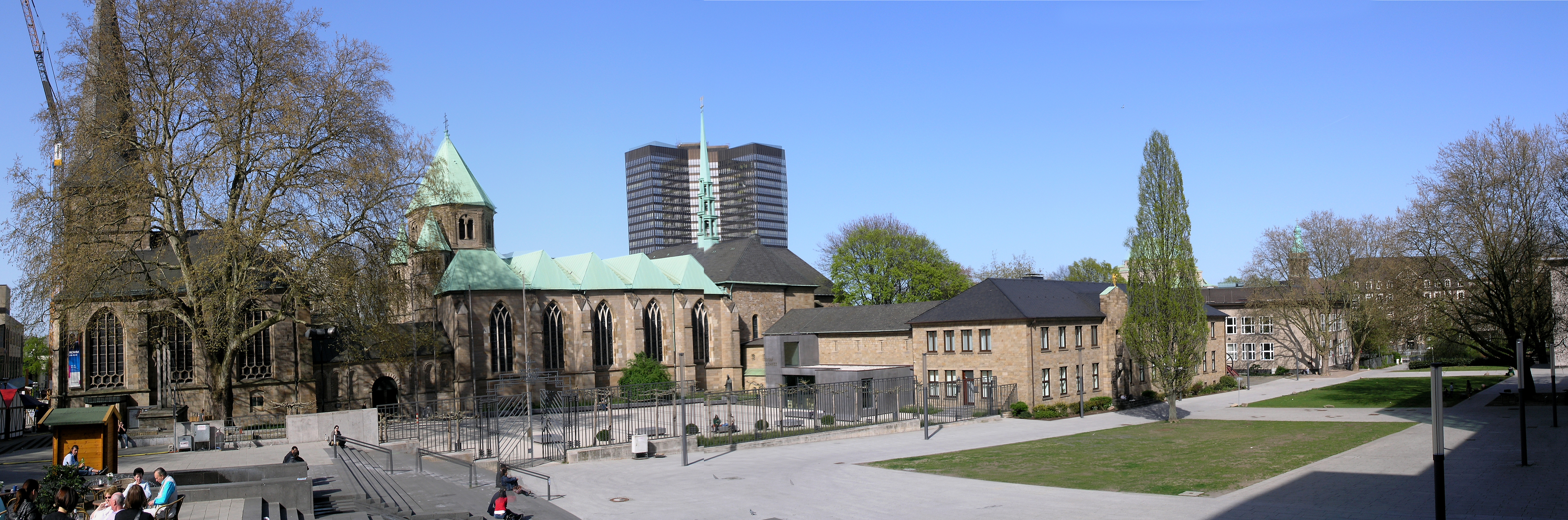 Северный Рейн - Вестфалия, Эссен - панорама Эссенского собора